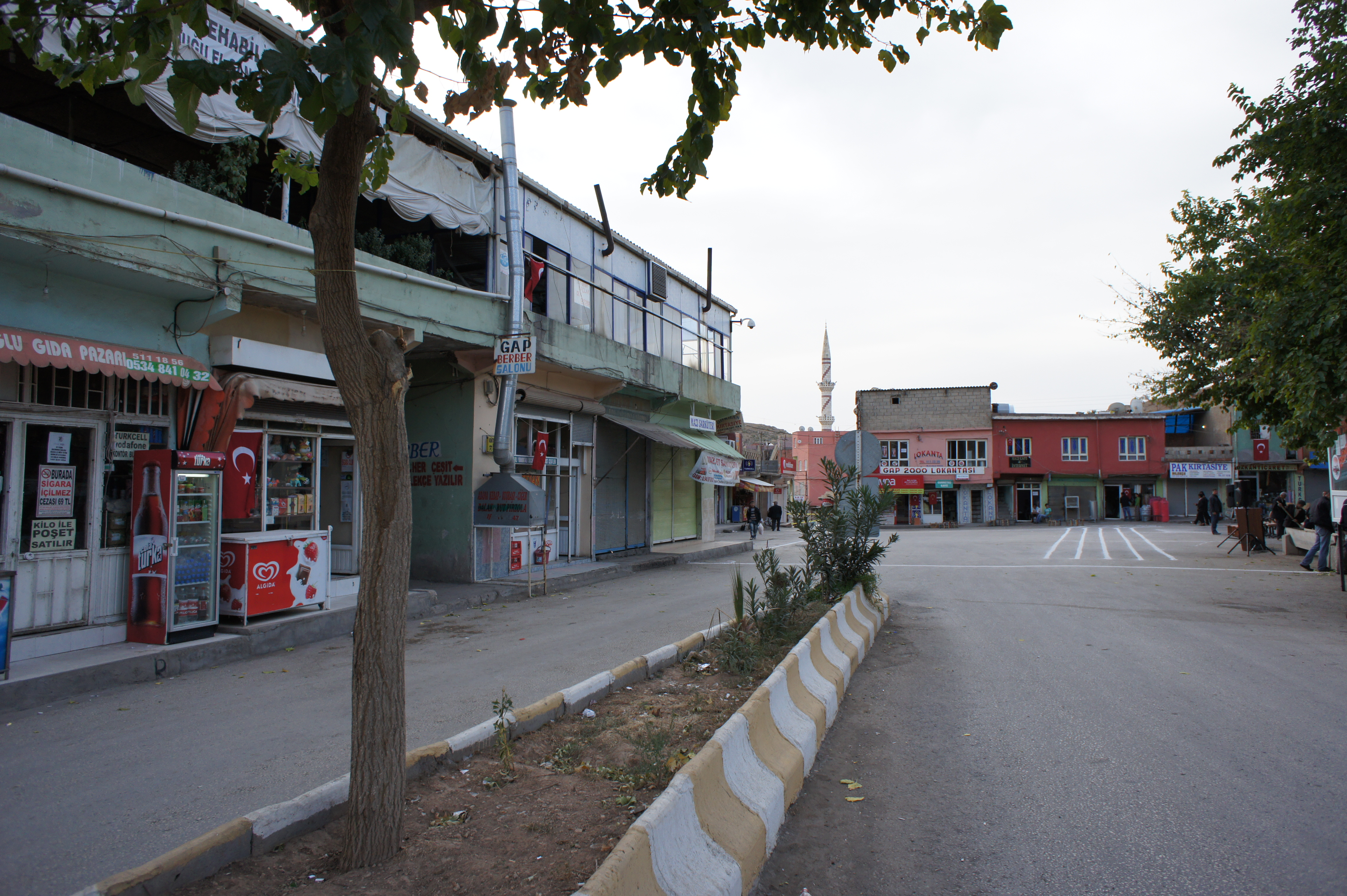 Kurdî: Shemrex, 2010.